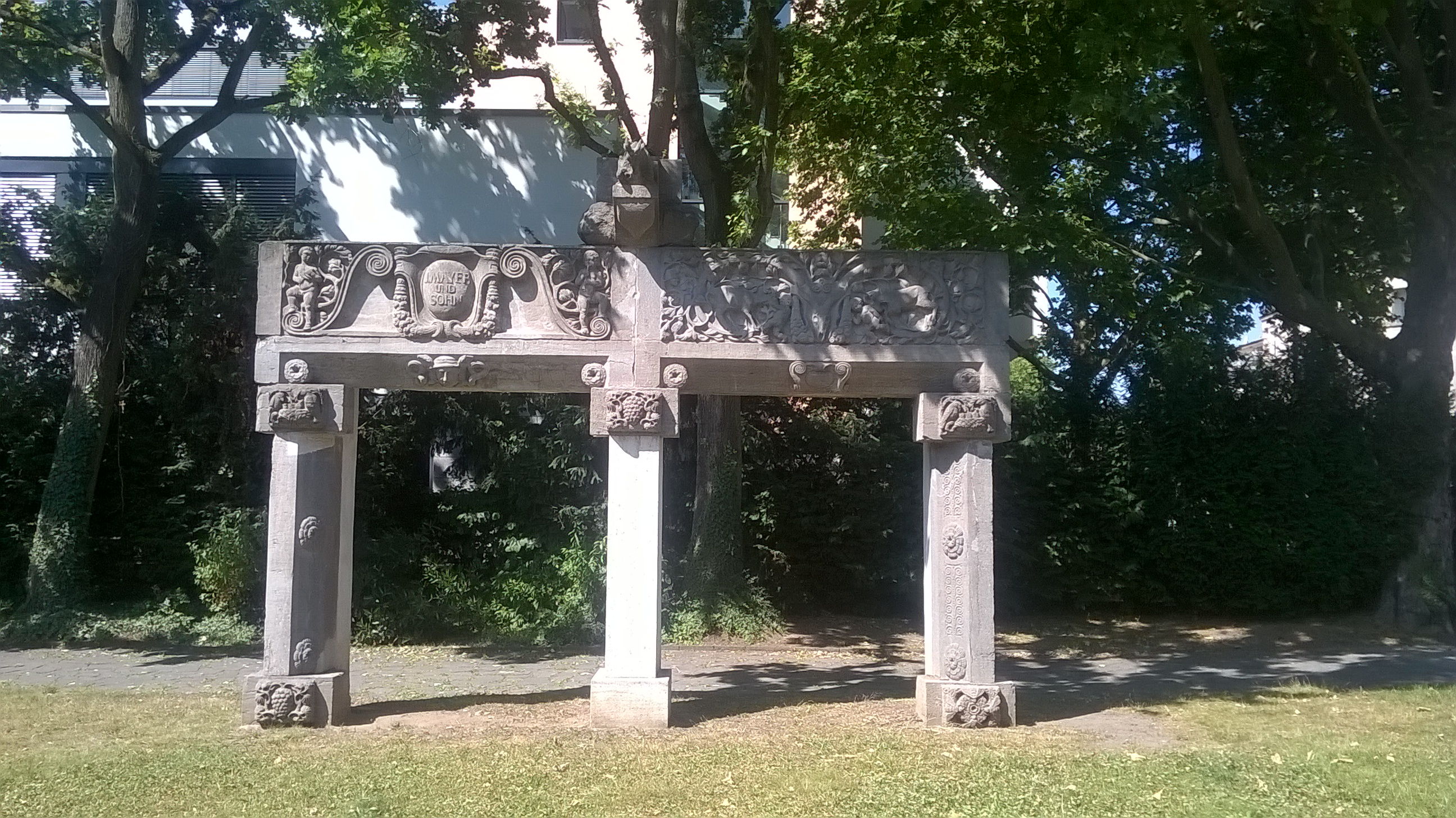 Portal der Lederfabrik J. Mayer auf der Freifläche vor dem Ledermuseum